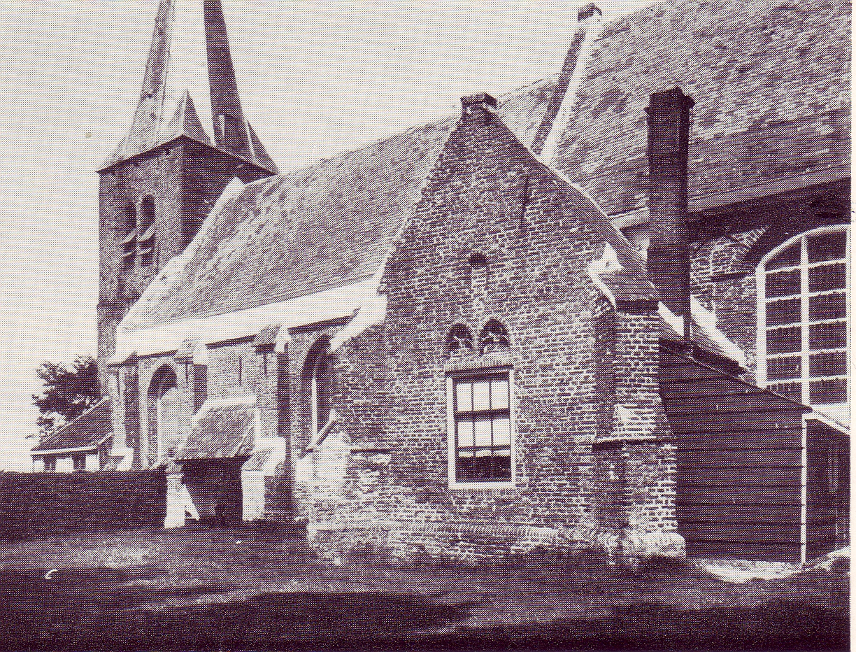 old church Sinoutskerke